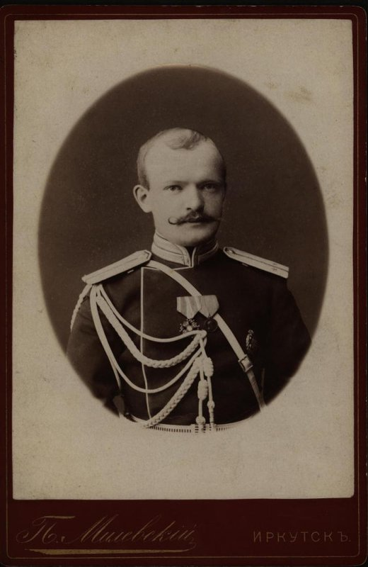 Мёрдер Алексей Иванович. Конец 1880-х гг. Иркутск. Фотограф П. Милевский.